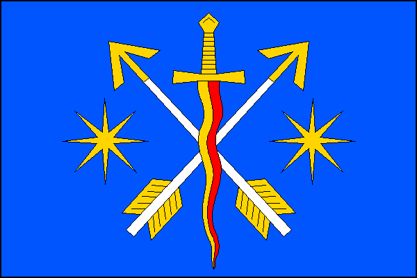 vlajka,Postřelmůvek , okres Šumperk